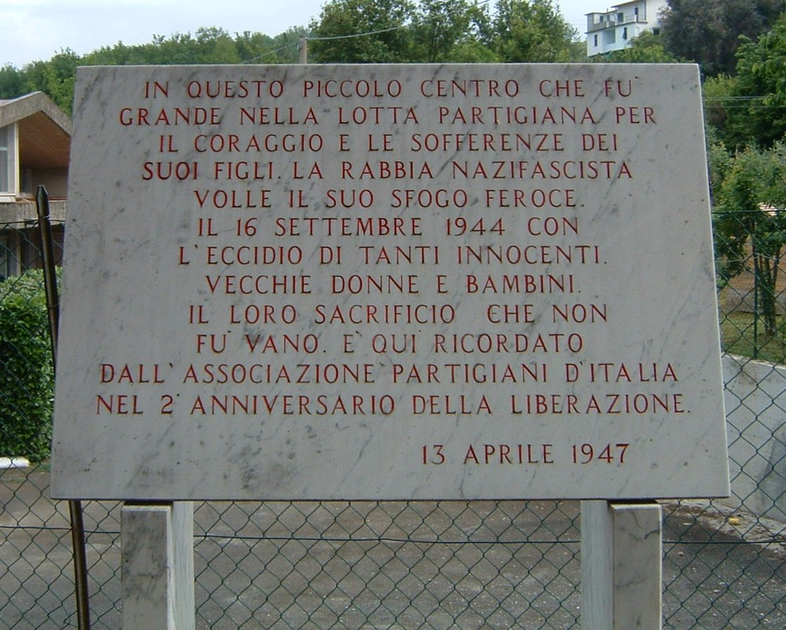 Lastra in ricordo dei caduti della strage di Bergiola Foscalina(16/09/1944)